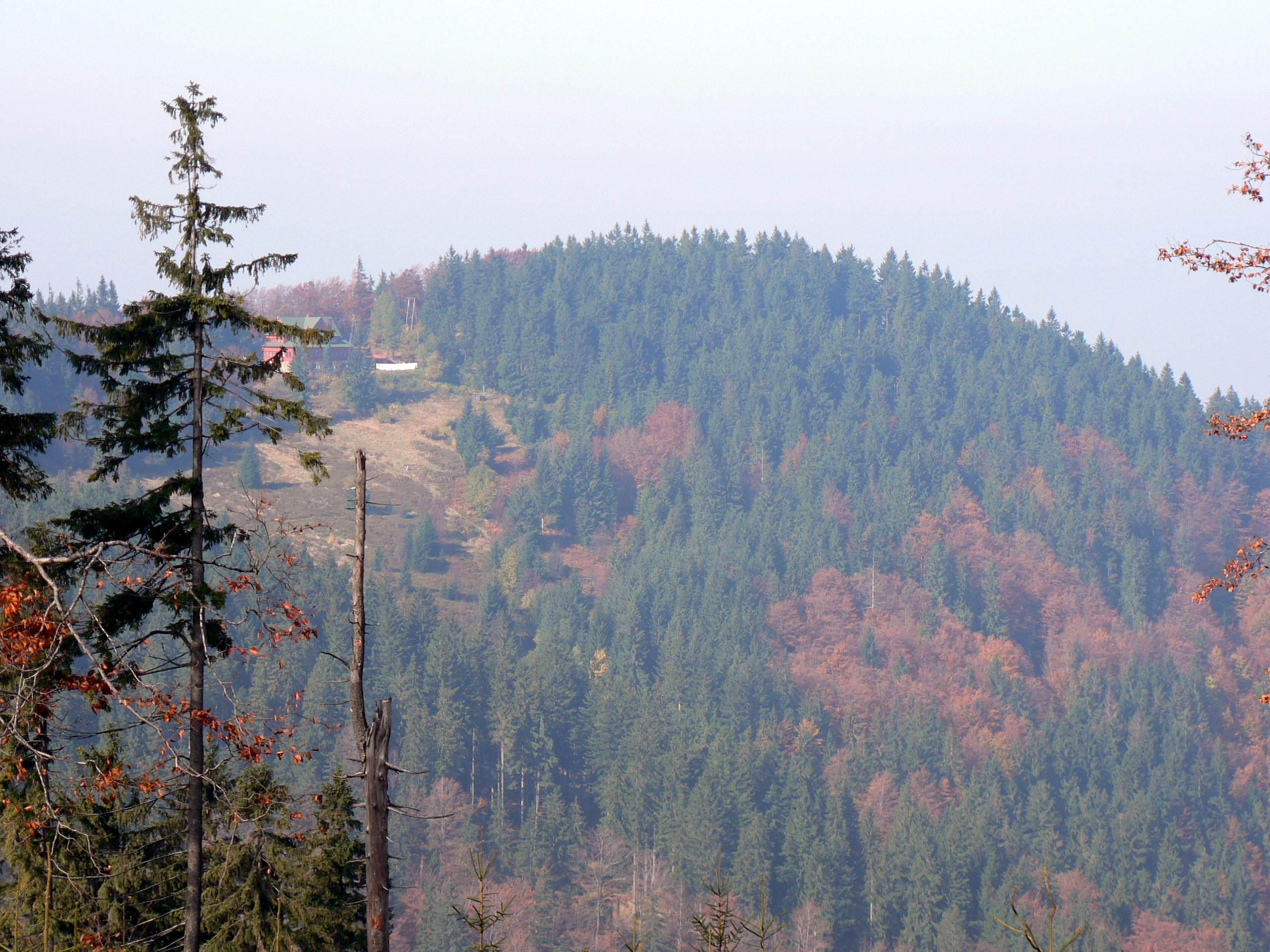 Stożek Wielki widziany ze szczytu Kiczor